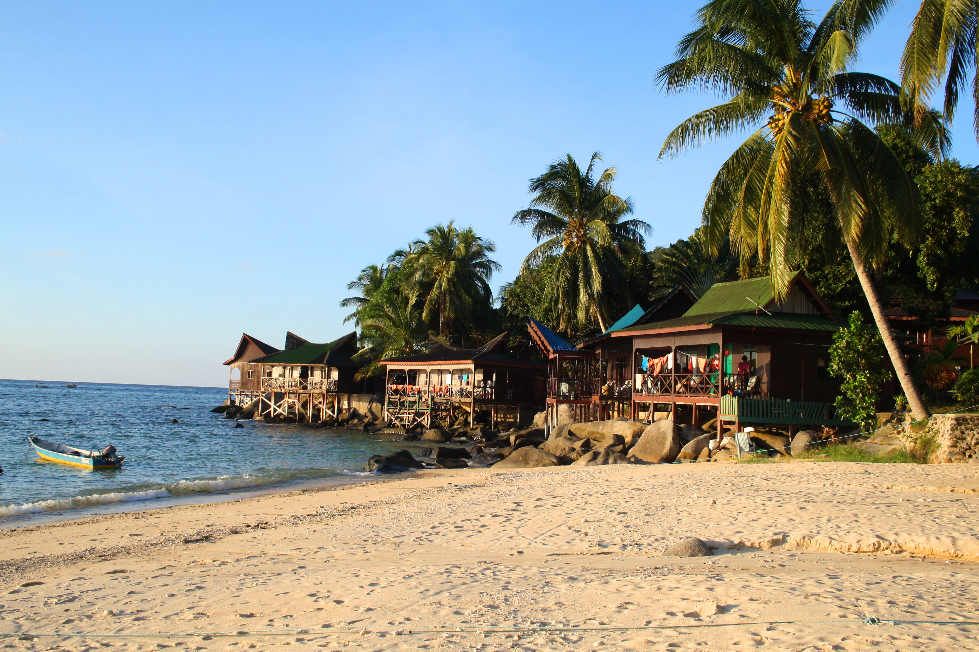 Pulau Tioman, Malaysia.